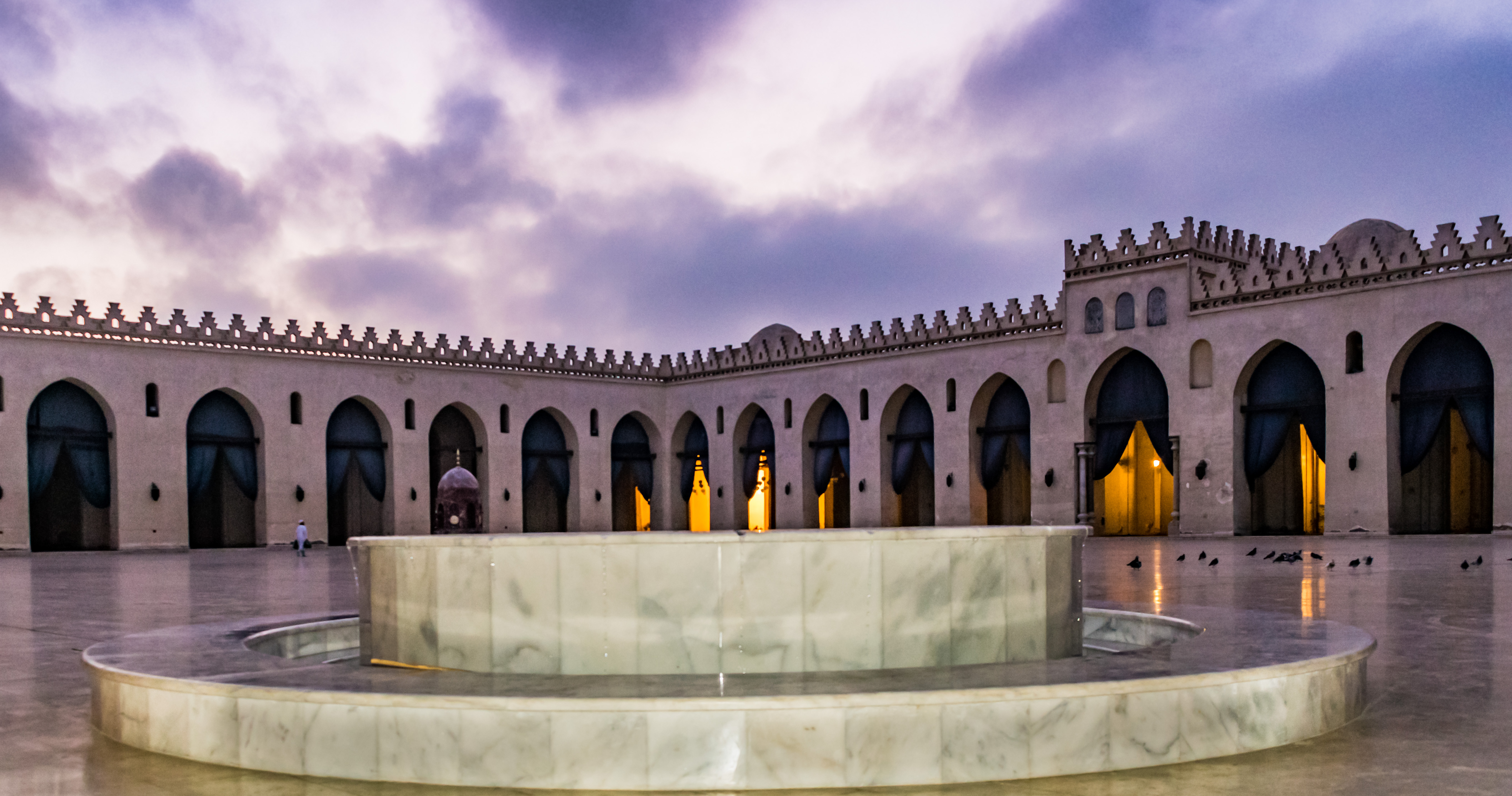 مسجد الحاكم بأمر الله .. بني عام 380 هـ في عهد العزيز بالله الفاطمي الذي بدأ في سنة 379هـ في بناء مسجد آخر خارج باب الفتوح ولكنه توفى قبل اتمامه فأتمه ابنه الحاكم بأمر الله 403هـ لذا نسب إليه وصار يعرف بجامع الحاكم.